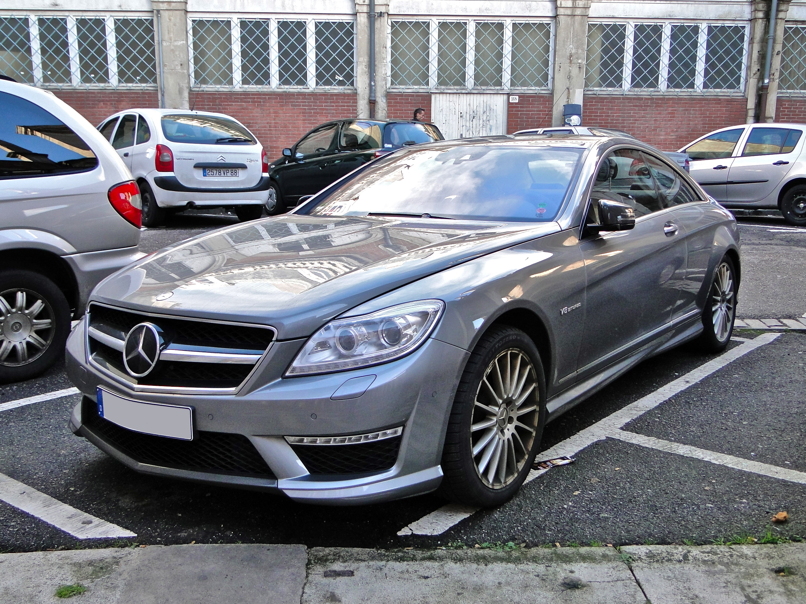 Mercedes-Benz CL63 AMG